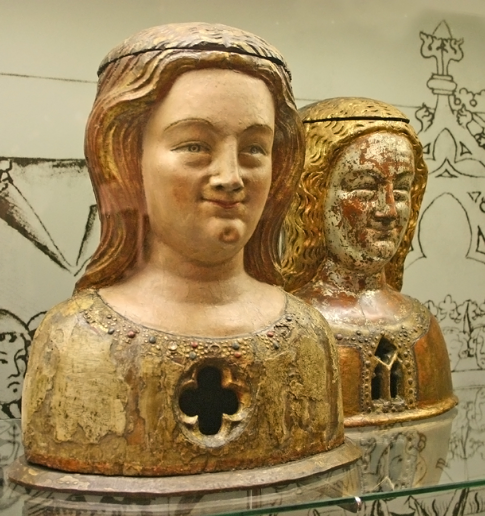 Ursula-Büste (Reliquienbüste), Köln, 14. Jahrhundert, Nussbaumholz, farbig gefasst / Stadtmuseum Köln